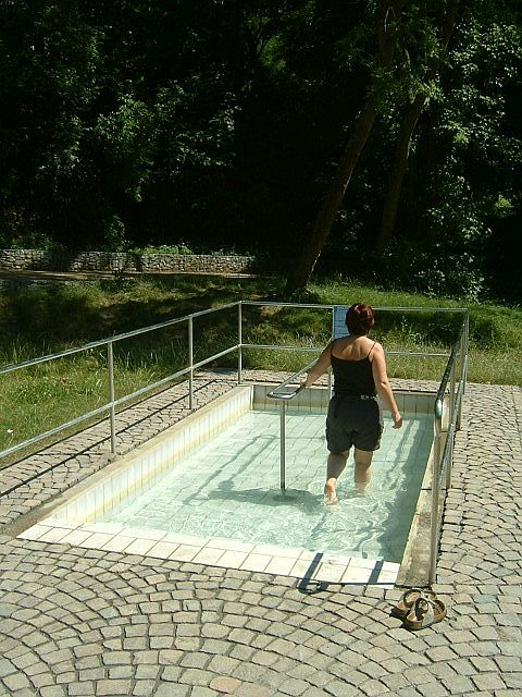 Frau im Kneippbecken beim Wassertreten. Das Becken befindet sich in Kronberg am Taunus bei den Kronthaler Quellen.